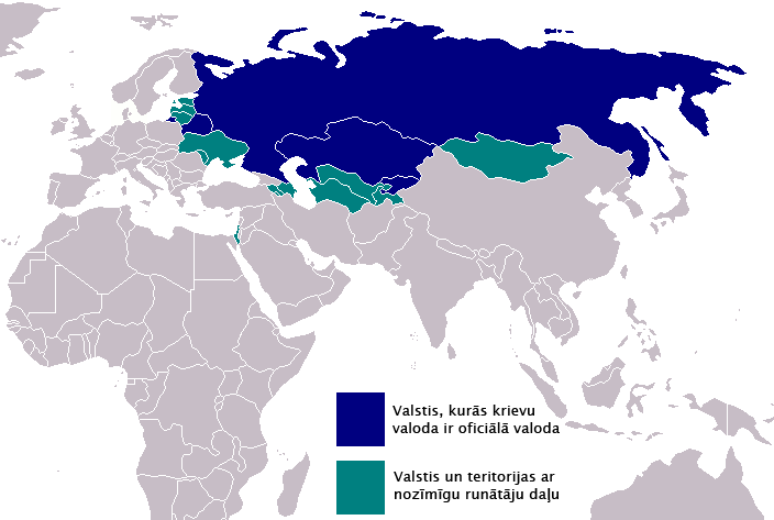 Map of Russian language